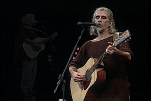 Músico brasileiro Oswaldo Montenegro em imagem do acervo da TV Brasil.